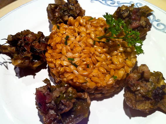 Flan de petit épeautre et ses bouchées d'agneau mariné